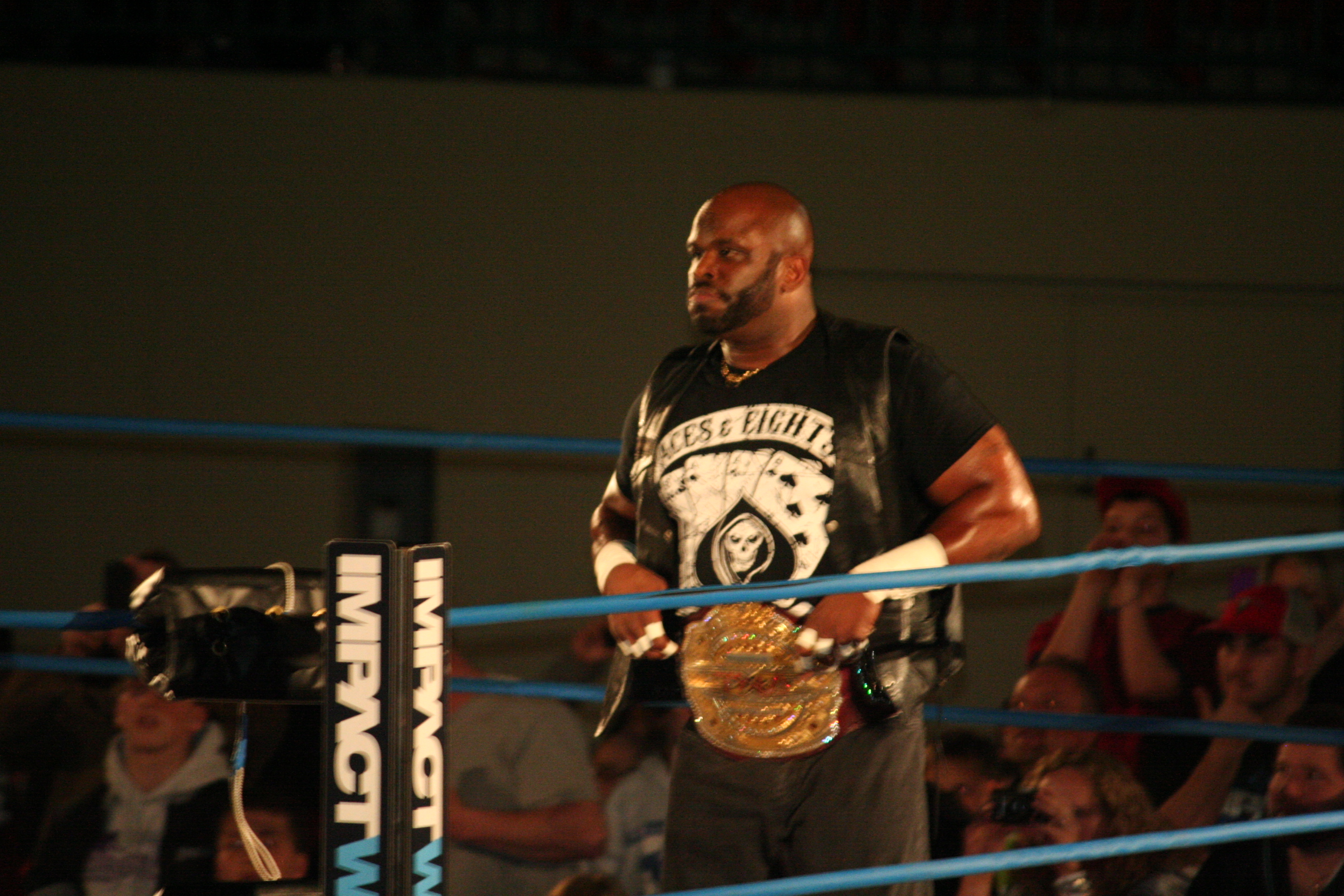 D Von